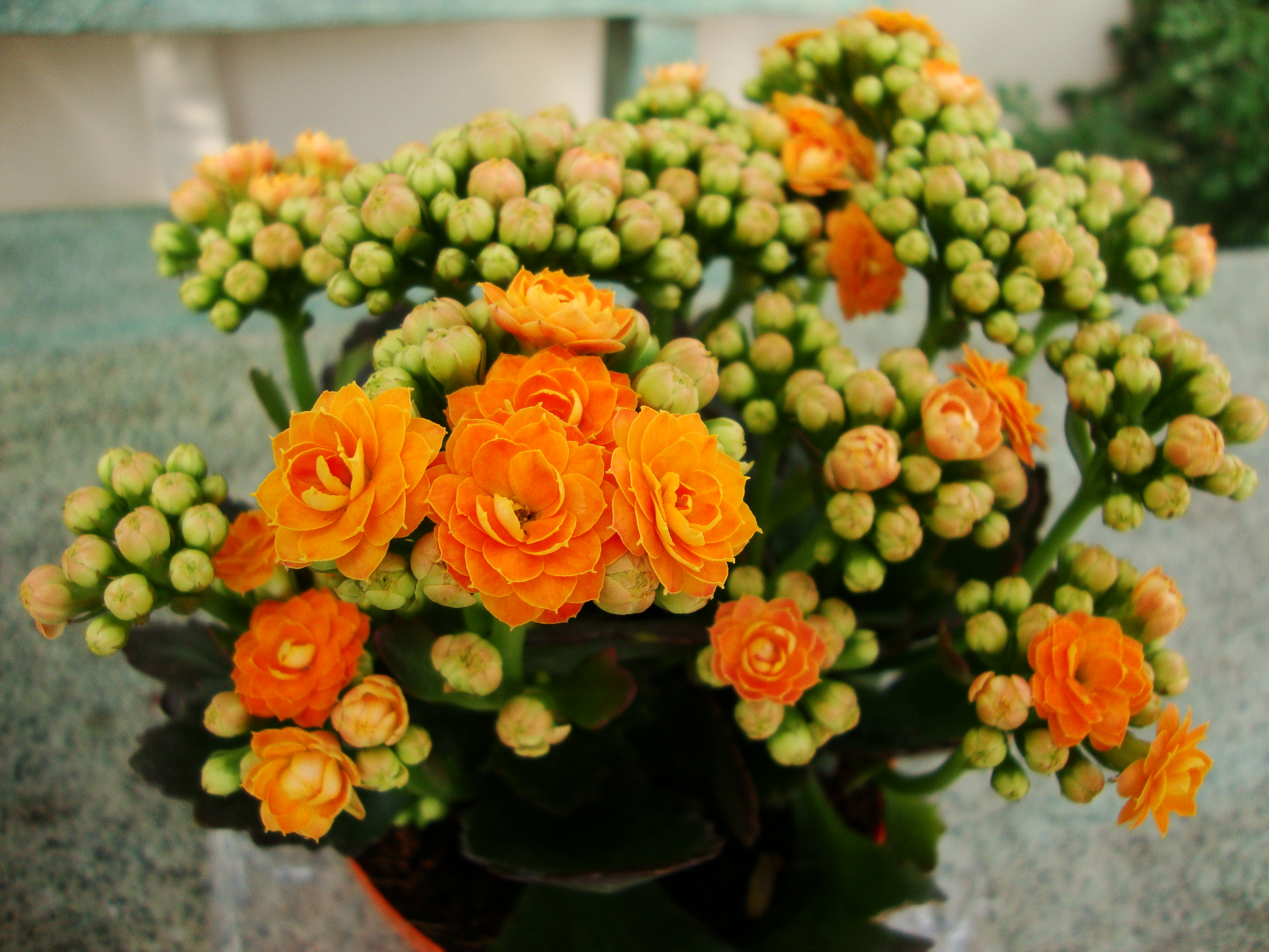 Kalanchoe blossfeldiana var. 'Calandiva'Tiếng Việt: Hoa sống đời, cây trường sinh xuân